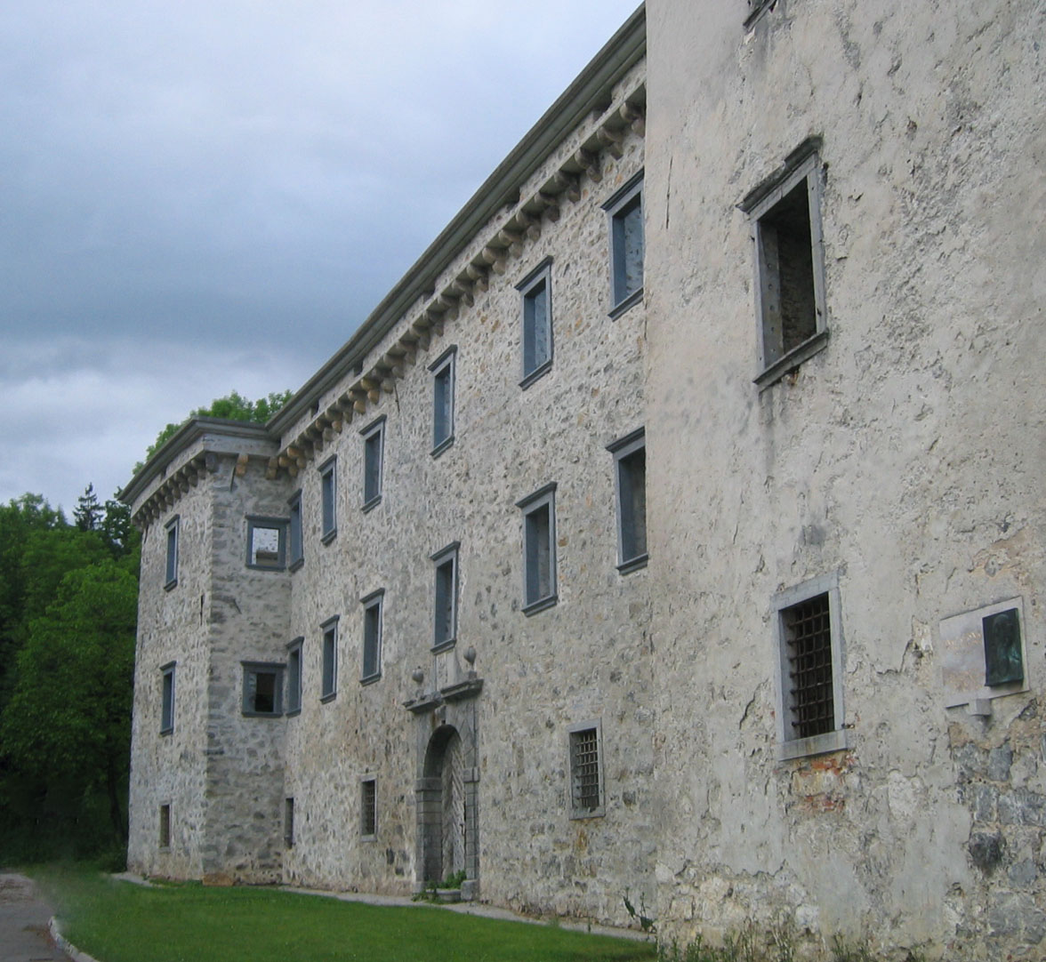 Brdo pri Lukovici castle, Slovenia